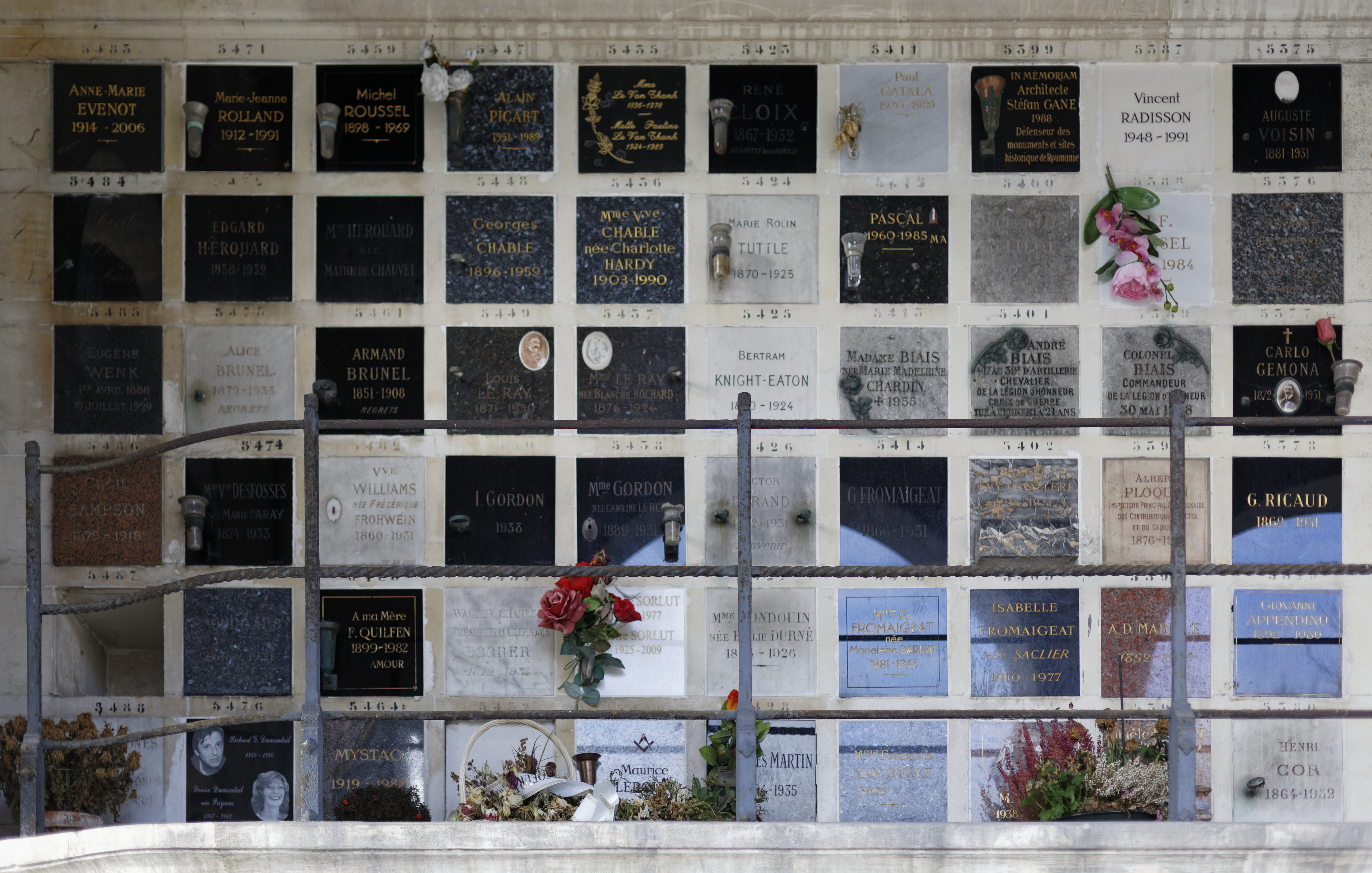 Cases du columbarium du cimetière du Père-Lachaise.